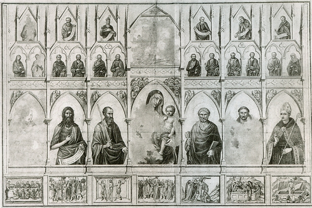 Santa Croce Altarpiece.